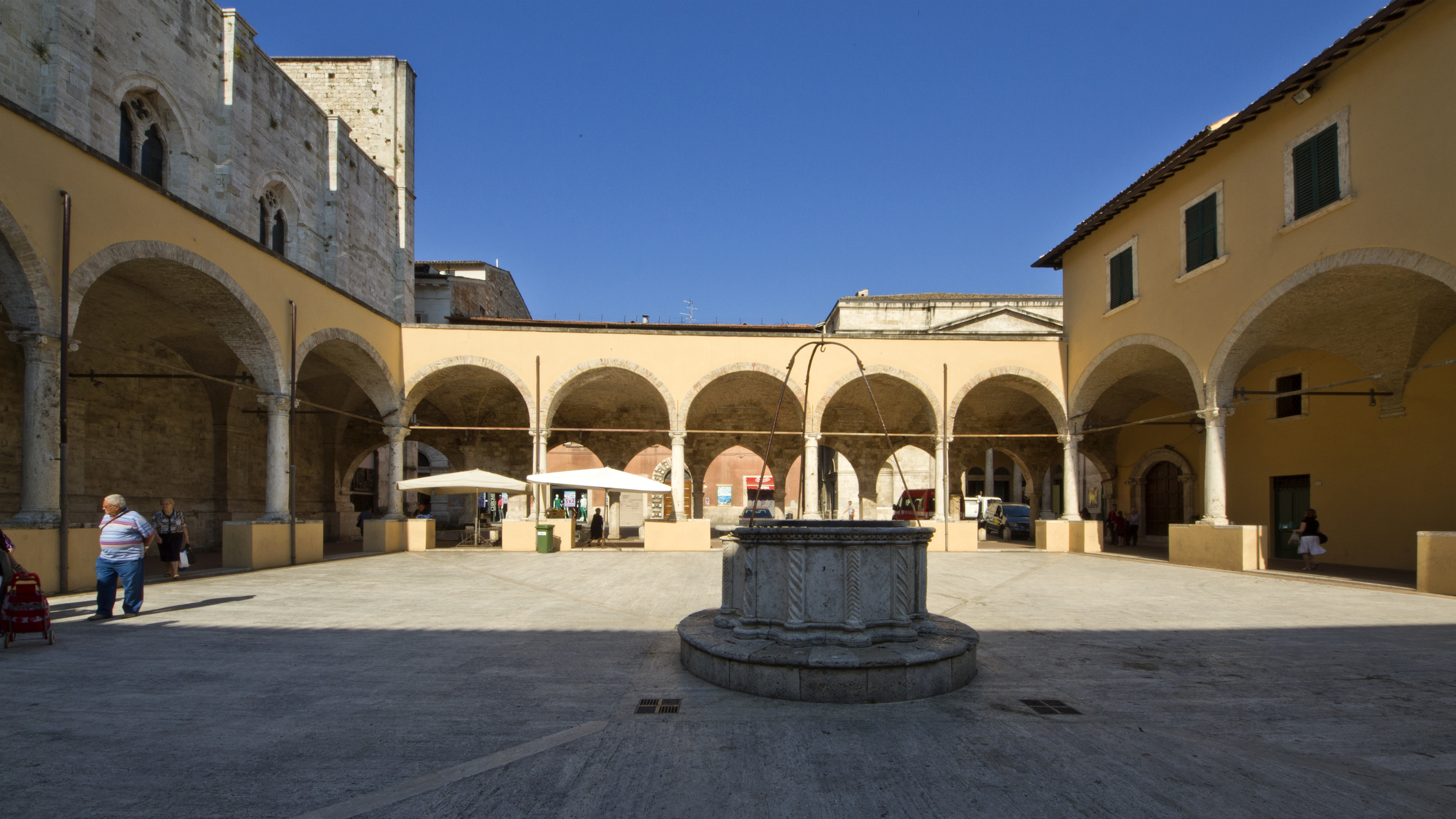 centro storico, 63100 Ascoli Piceno AP, Italy